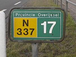 hectometerpaaltje prov. Overijssel